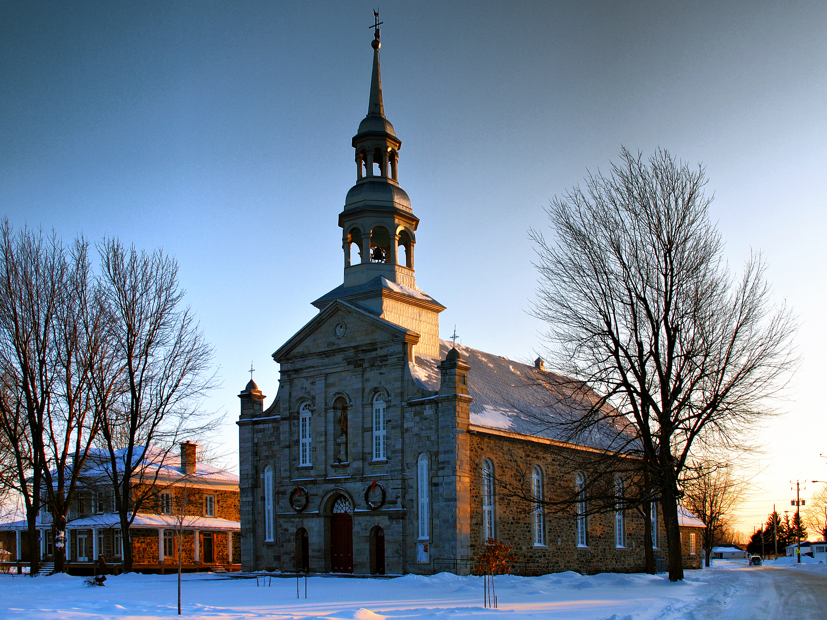 Sainte-Brigide-d'Iberville - Eglise Sainte-Brigide